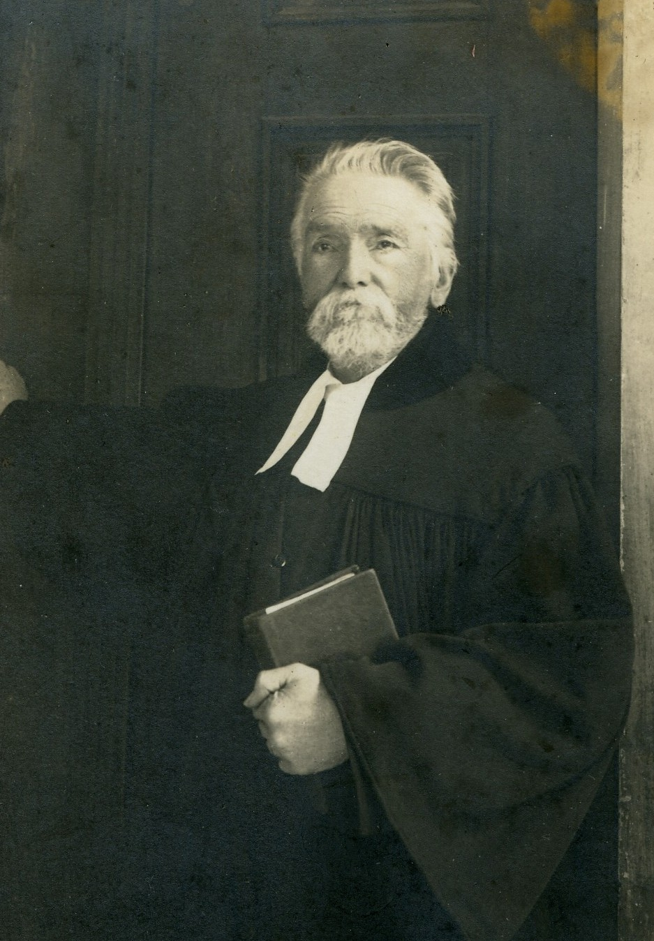 Porträtfoto Pfarrer Ernst Schwarz im Talar mit Buch